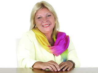 Imagen de Elisa Carrió publicada en la página de la Honorable Cámara de Diputados de la Nación.